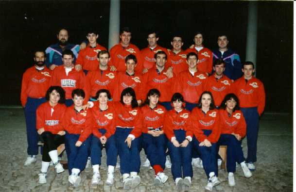 Gaztedi Sokatira taldea 1991ean